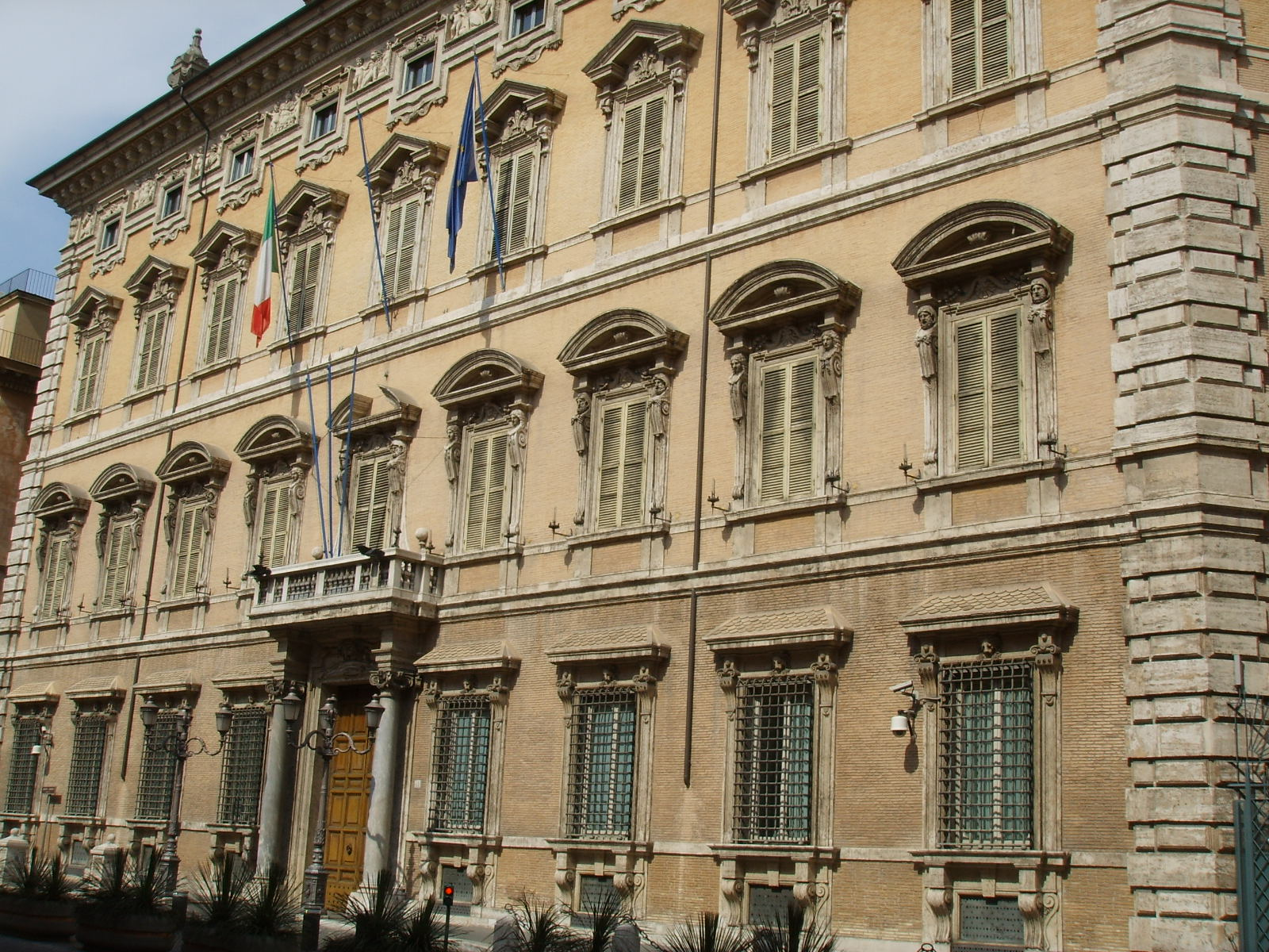 Palazzo Madama, Senato in Rome, Italy